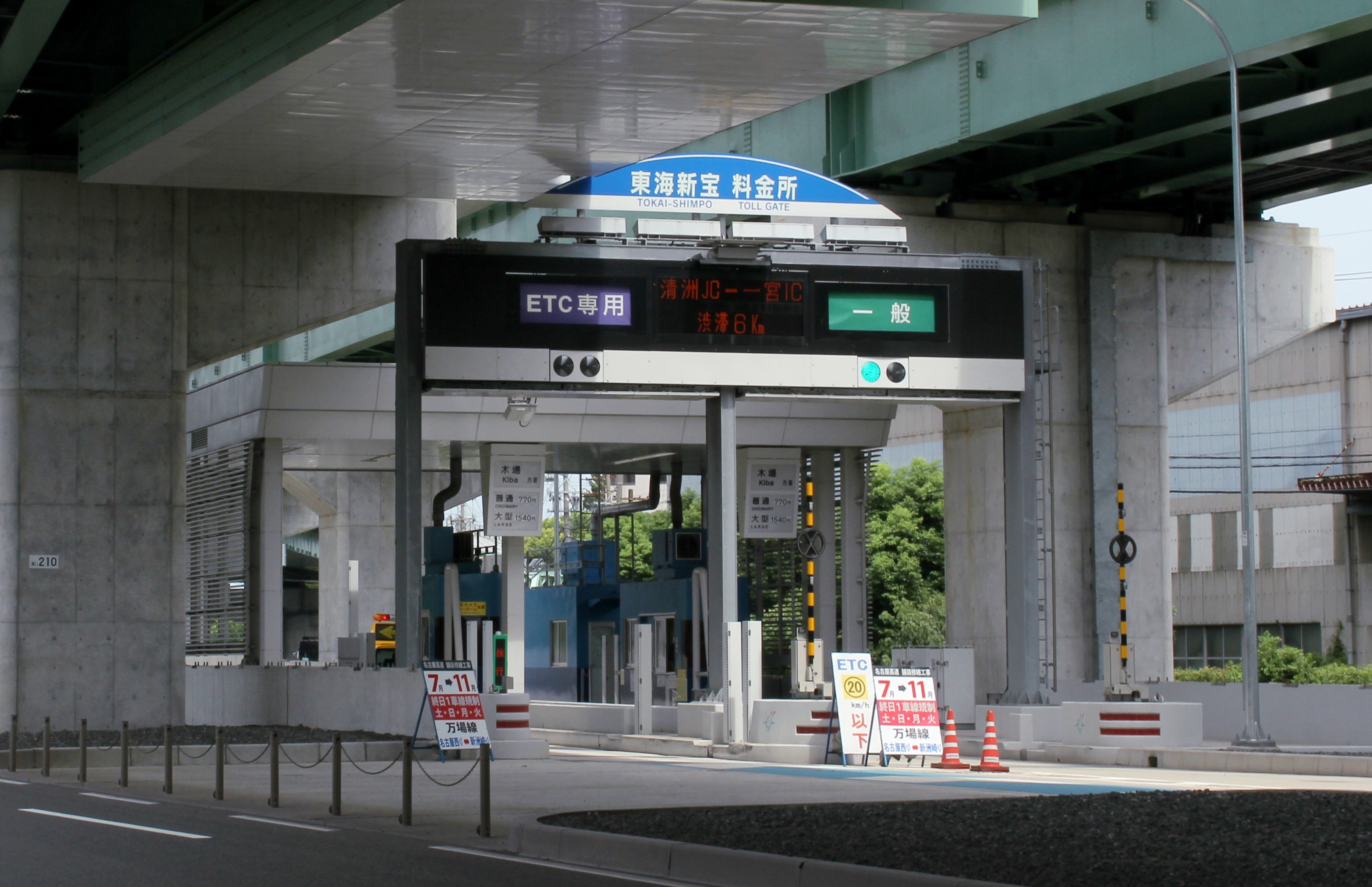 名高速4号東海線 東海新宝料金所